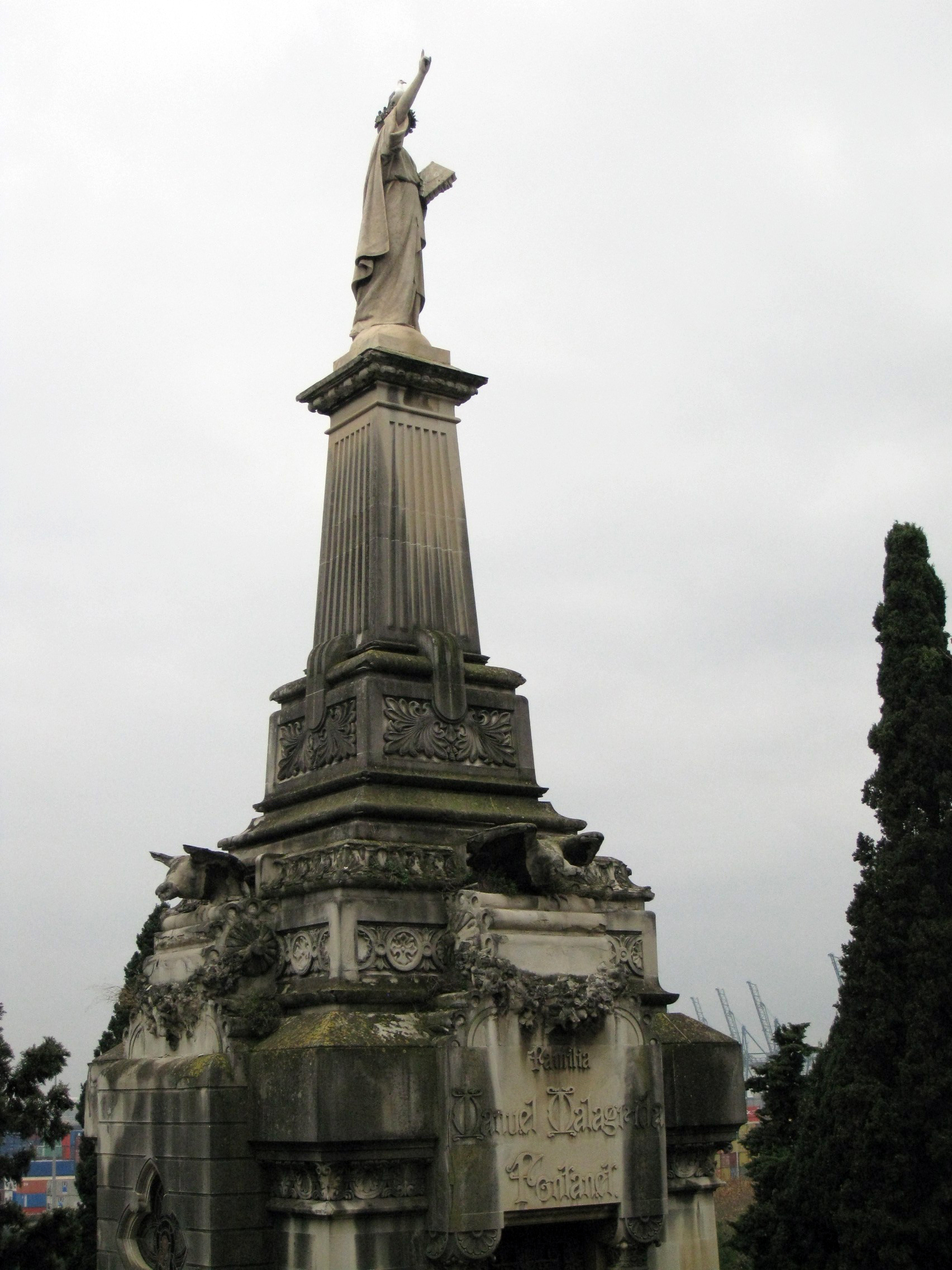 Cementiri de Montjuïc (Barcelona) Object location41° 21′ 12.22″ N, 2° 09′ 16.74″ E